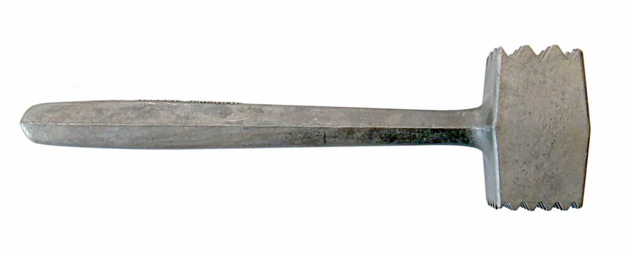 Fleischhammer Bearbeitung: Benutzer:Rainer Zenz Ursprüngliche Version: Bild:Fleischhammer.jpg